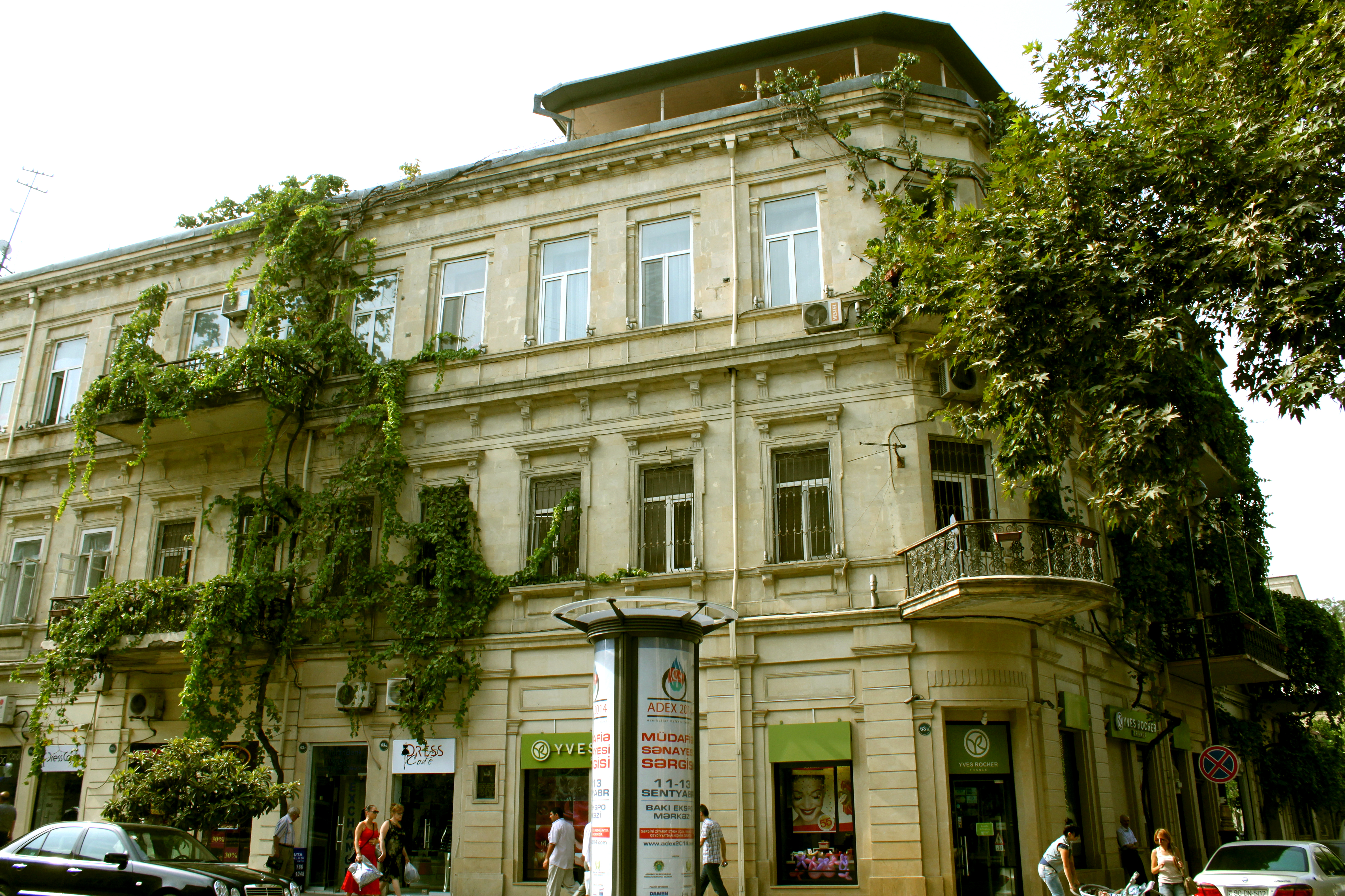 Yaşayış evi, İstiqlaliyyət küçəsi, 43